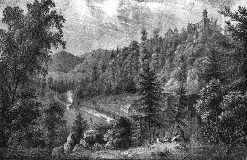 Ruine der Kynsburg in Schlesien